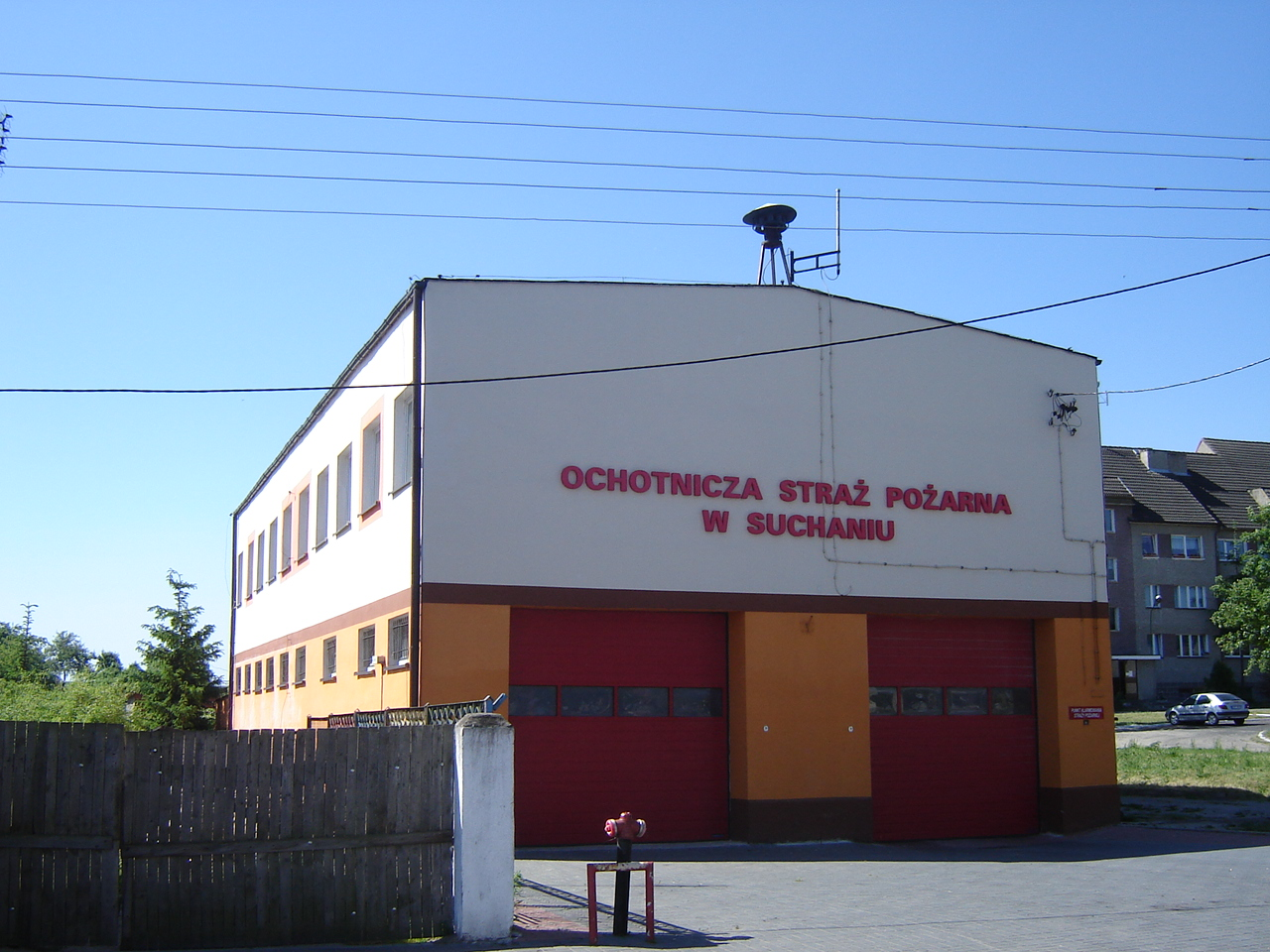 Budynek ochotniczej Straży Pożarnej w Suchaniu